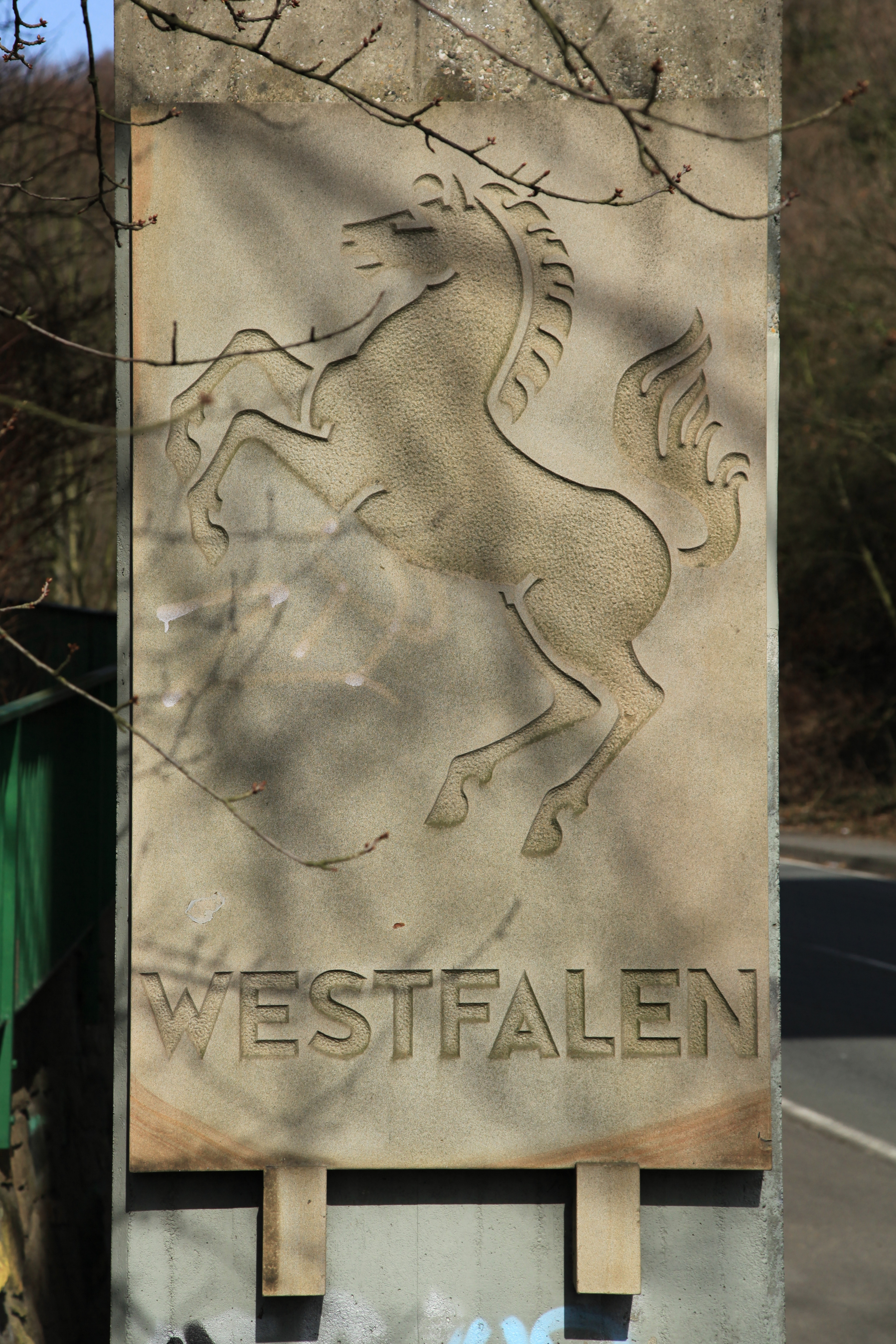 Brücke der Hengsteystraße über sich selbst in Dortmund-Syburg, Westfalen-Wappen